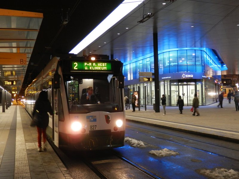 Augsburger Straßenbahnwagen 827 an der neuen Haltestellenalage Königsplatz